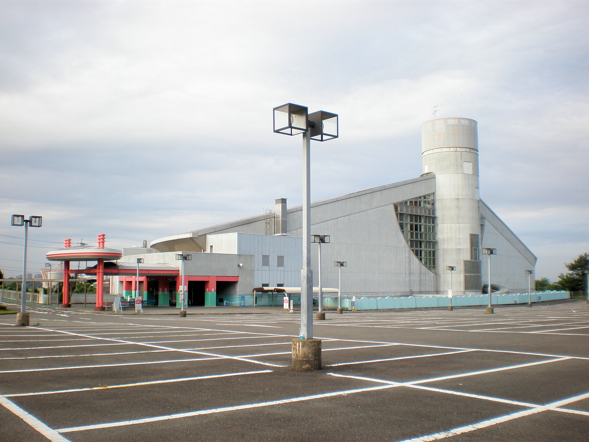 愛知県小牧市にある小牧市温水プール